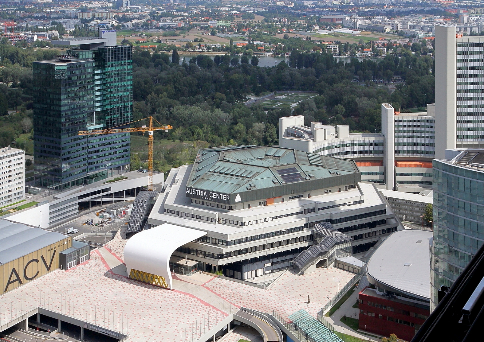 Das Austria Center Vienna (ACV) vom DC Tower aus betrachtet, beziehungsweise die Südwestansicht des ACV. Im Hintergrund links der Saturn Tower und rechts das Vienna International Centre.